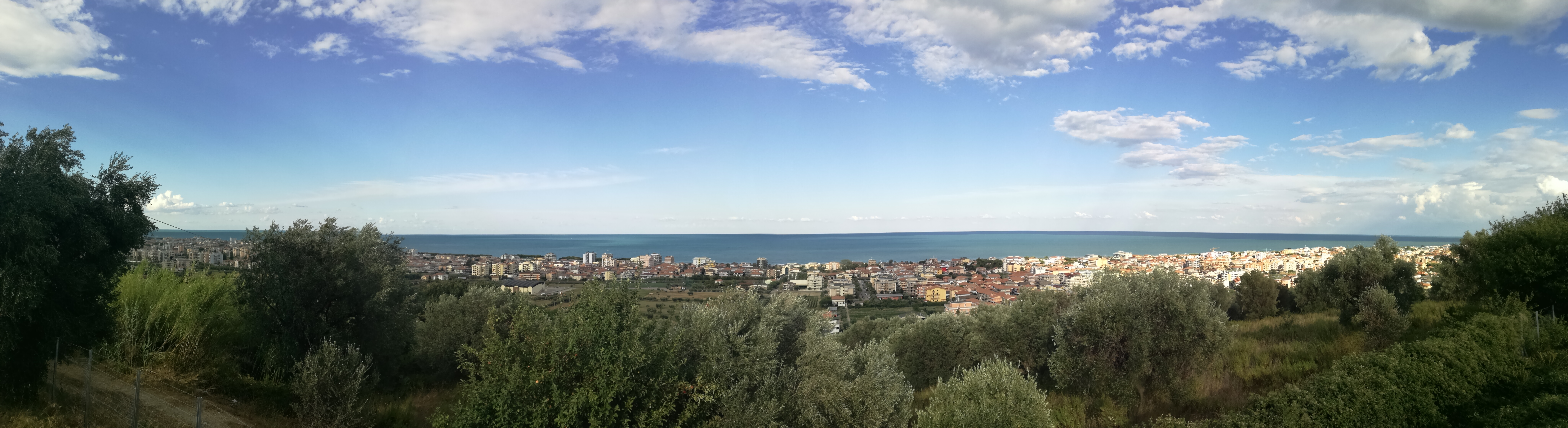 Panoramica sul mare dalla stazione di servizio di Tortoreto